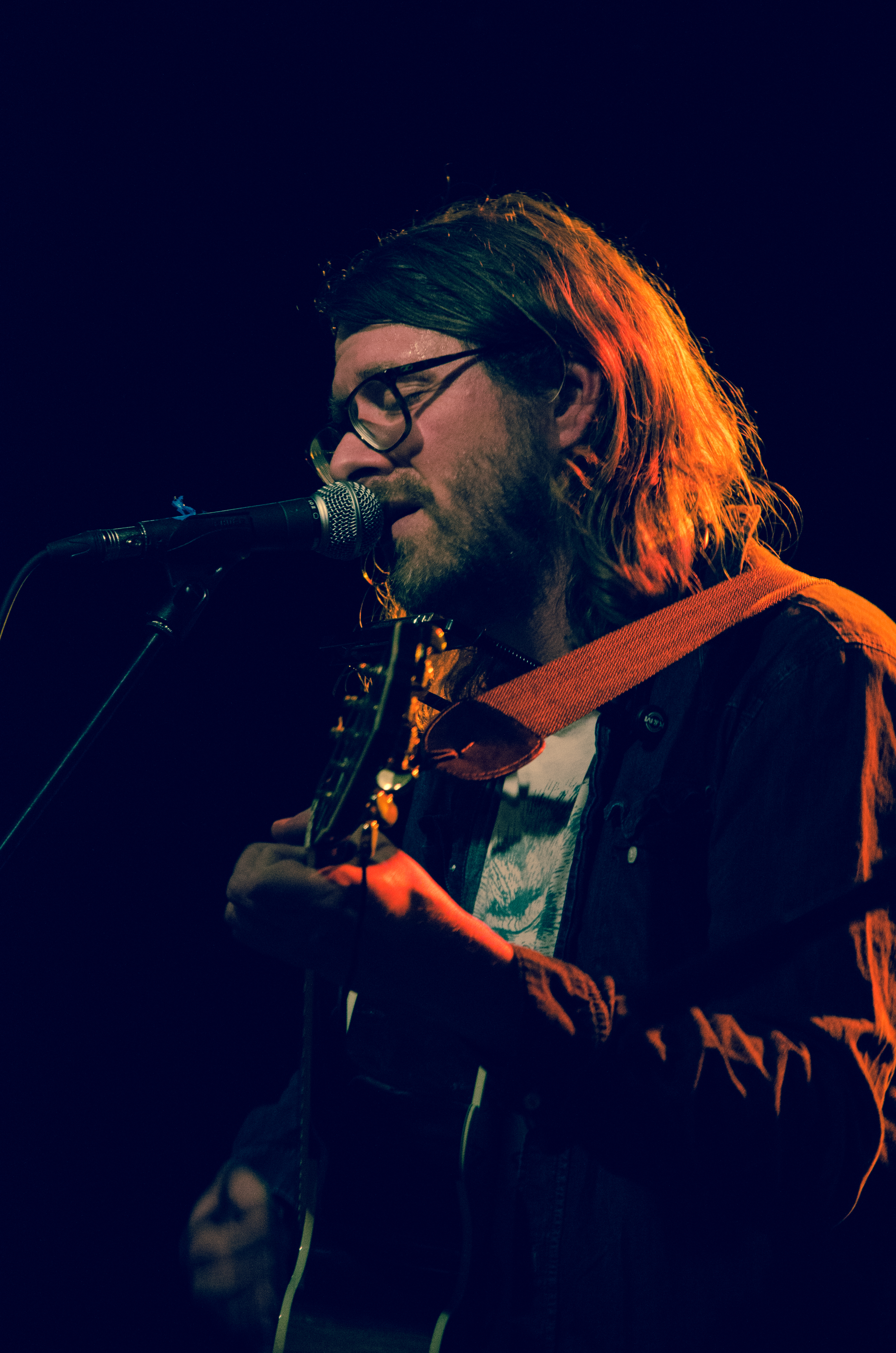 Francesco Wilking, Sänger der Band "Tele" und bei "Die Höchste Eisenbahn". Aufgenommen in der naTo Leipzig.